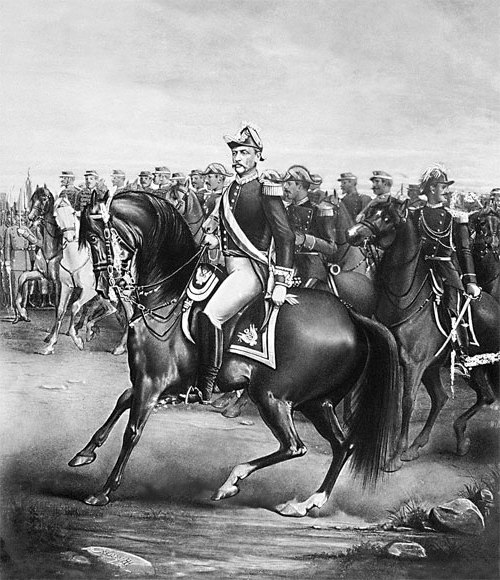 General Miguel Iglesias, Presidente del Perú